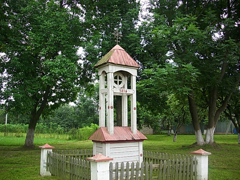 Маркава. Каплічка